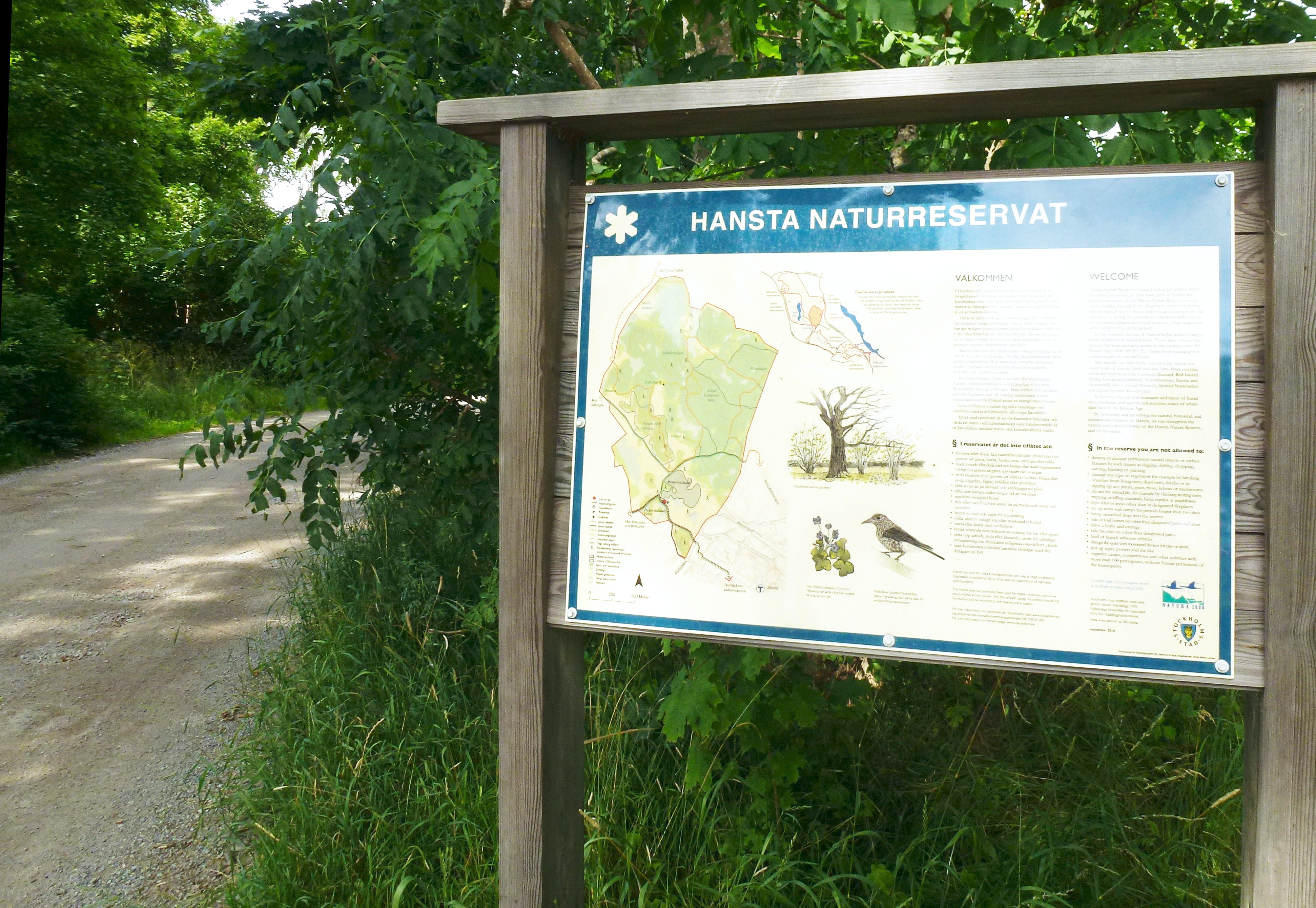 Hansta naturreservat skylt